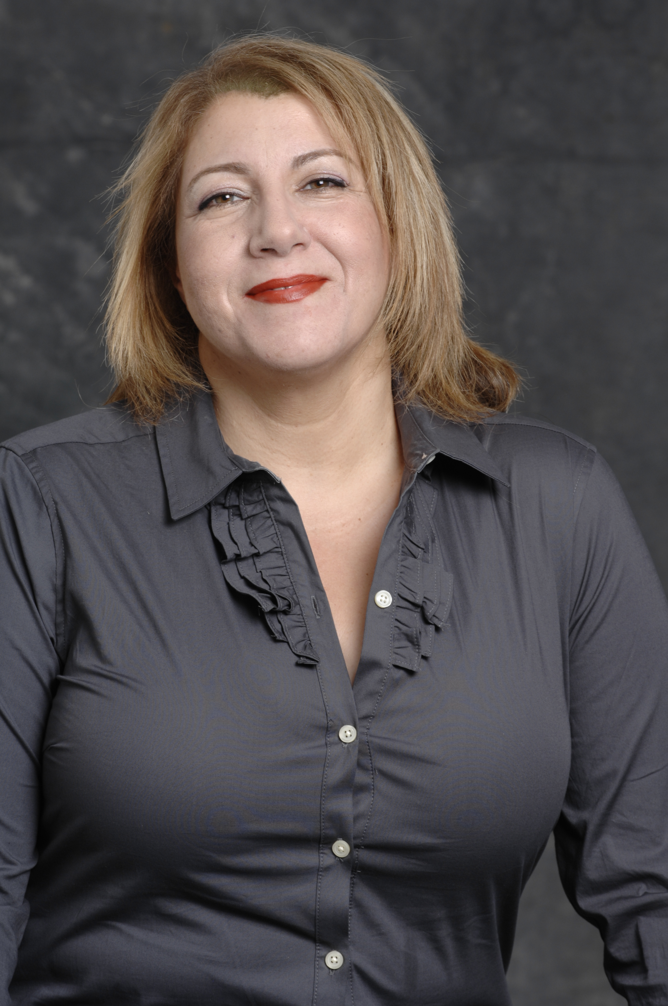 אתי חסיד